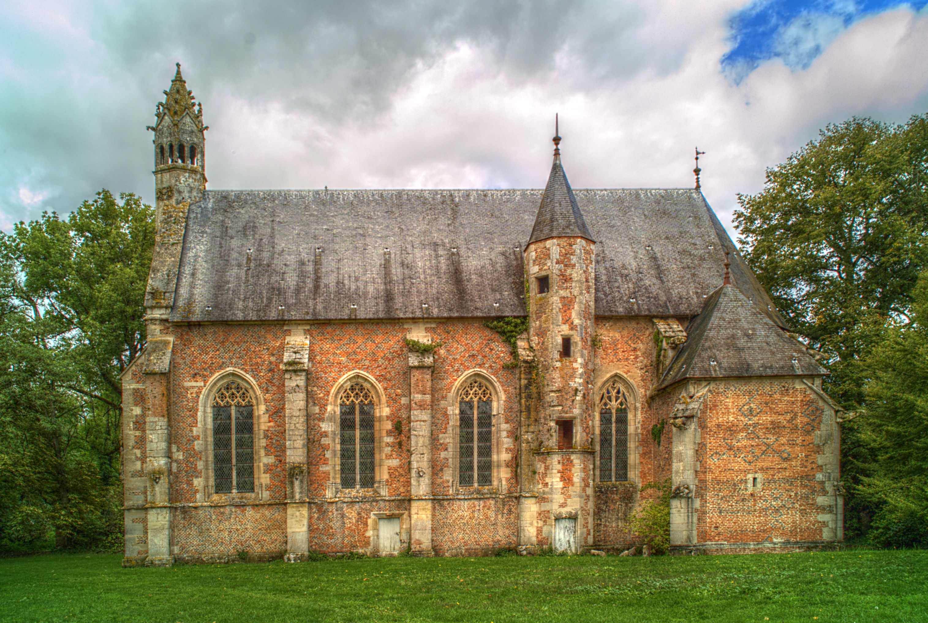 Vue générale, Chapelle castrale, Pagny-le-Château (Côte d'Or, Bourgogne, France)